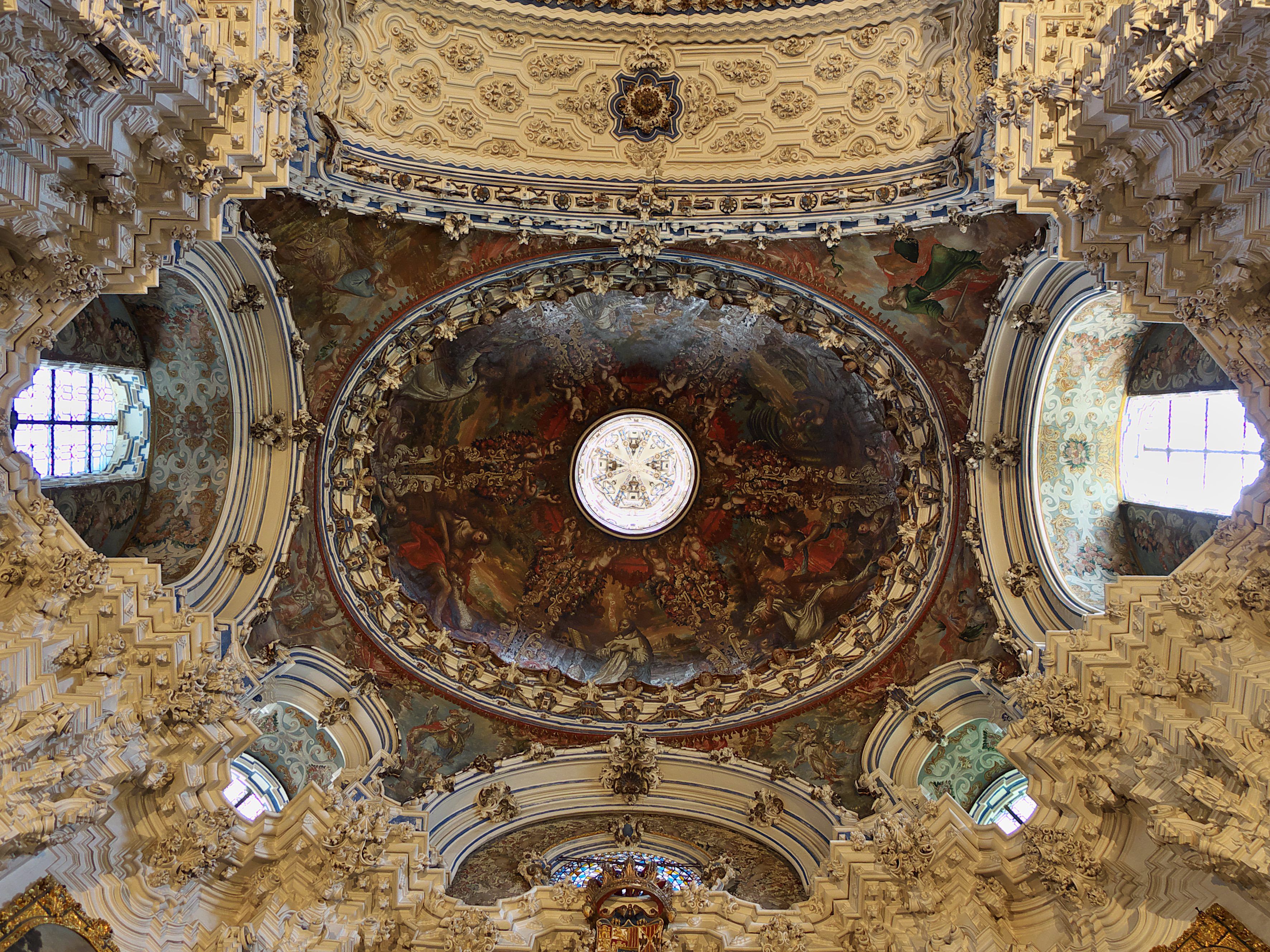 Bóveda elíptica de autor desconocido, pintada por Tomás Ferrer (1735).